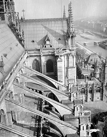 Façade sud : arcs-boutants et transept pris du haut de la tour sud-ouest